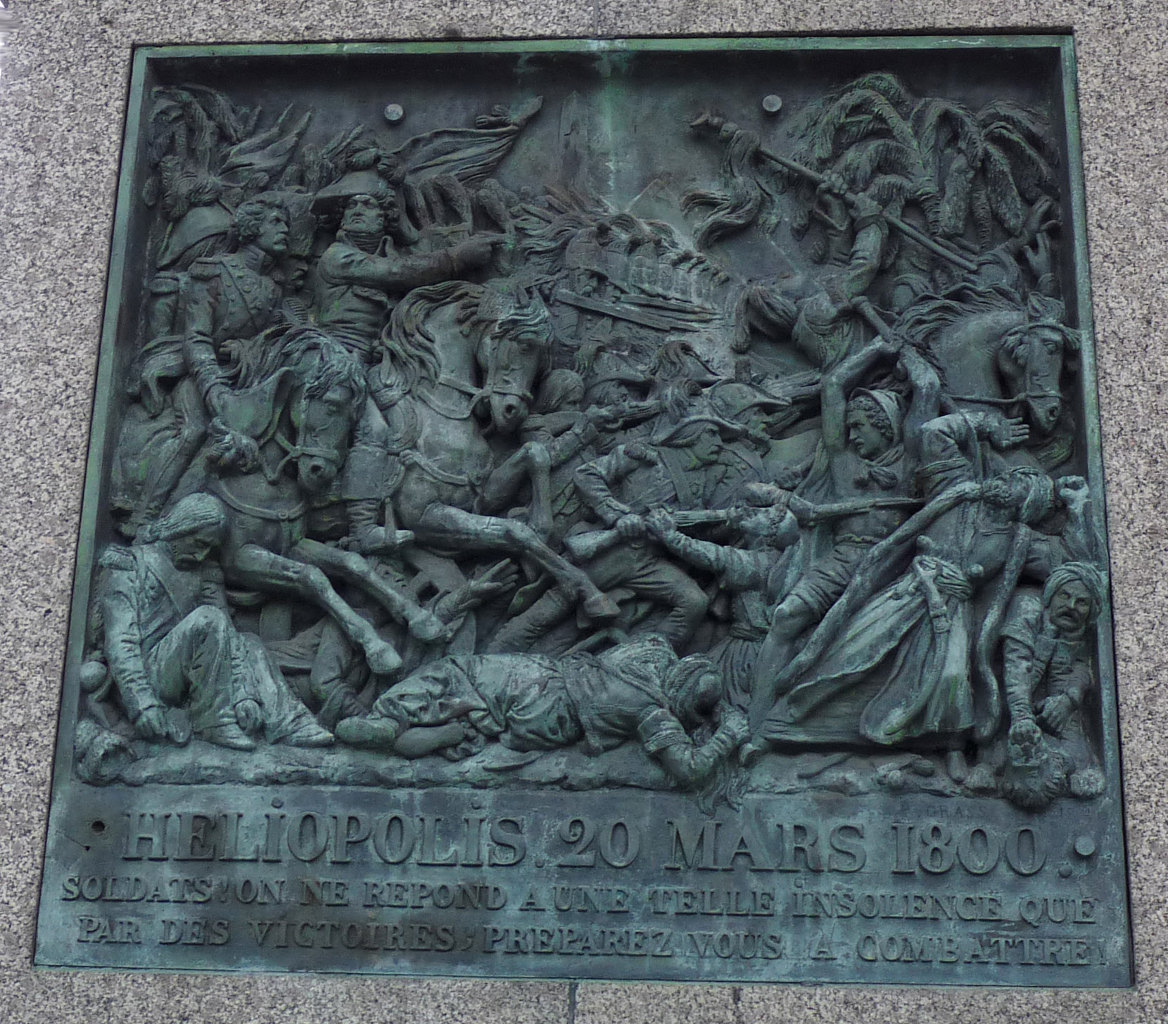 Le général Kléber victorieux à Héliopolis, 20 mars 1800 (socle de la statue du général sur la place Kléber à Strasbourg